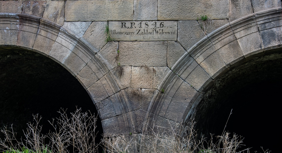 Tablica na murze oporowym w Nietulisku Dużym.